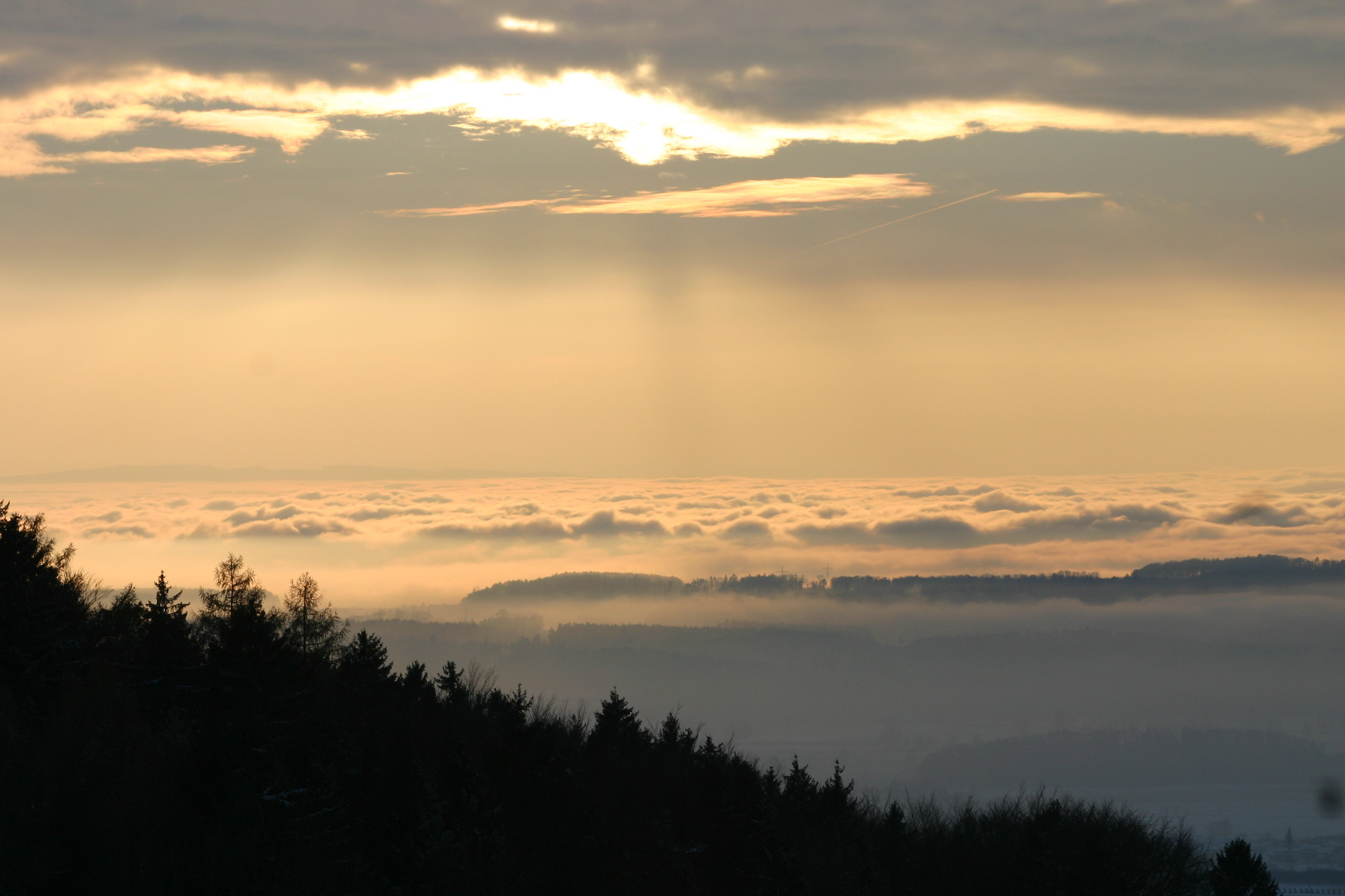 Blick vom Gehrenberg über den See